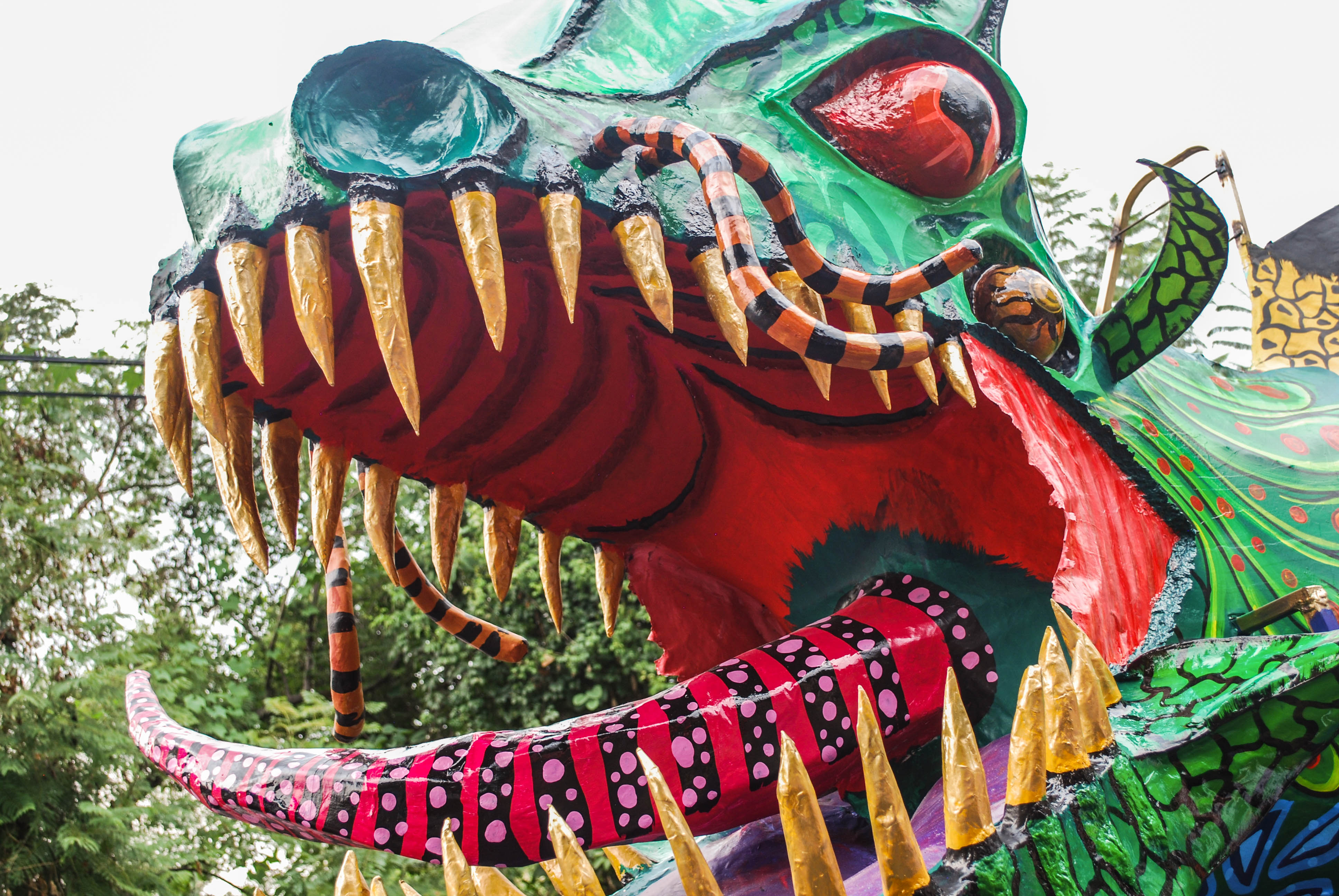 Alebrije gigante, utilizado para Mojiganga Zacualpan, Morelos.